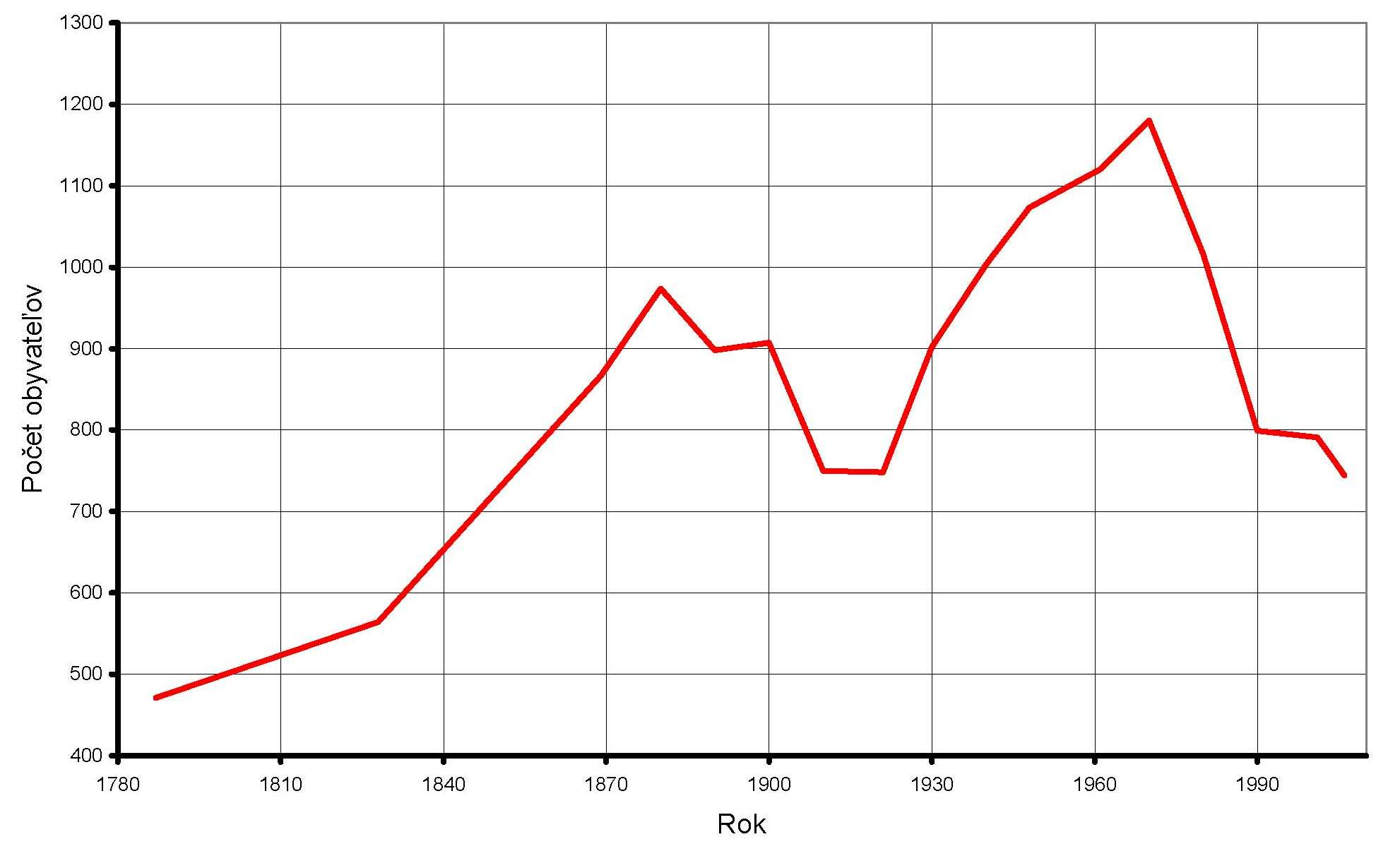 Demografický vývoj Orlov od roku 1787